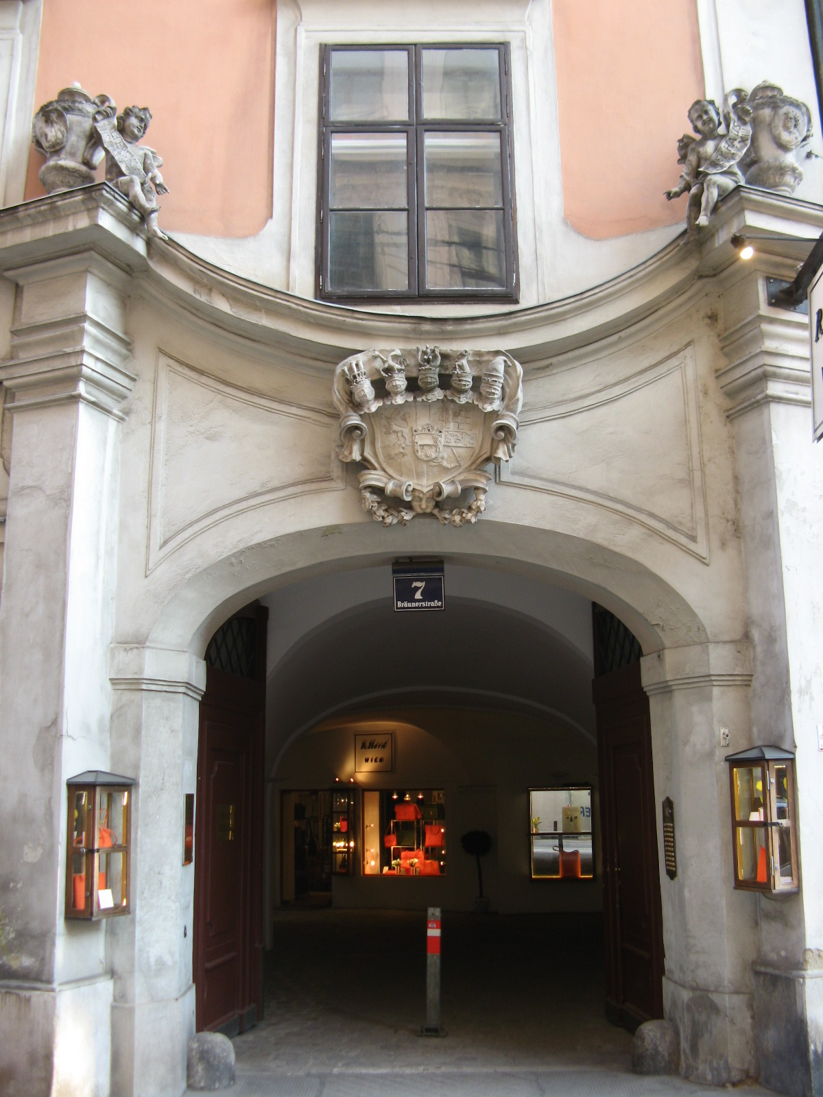 Portal, Palais Walterskirchen, Bräunerstraße 7, Wien-Innere Stadt